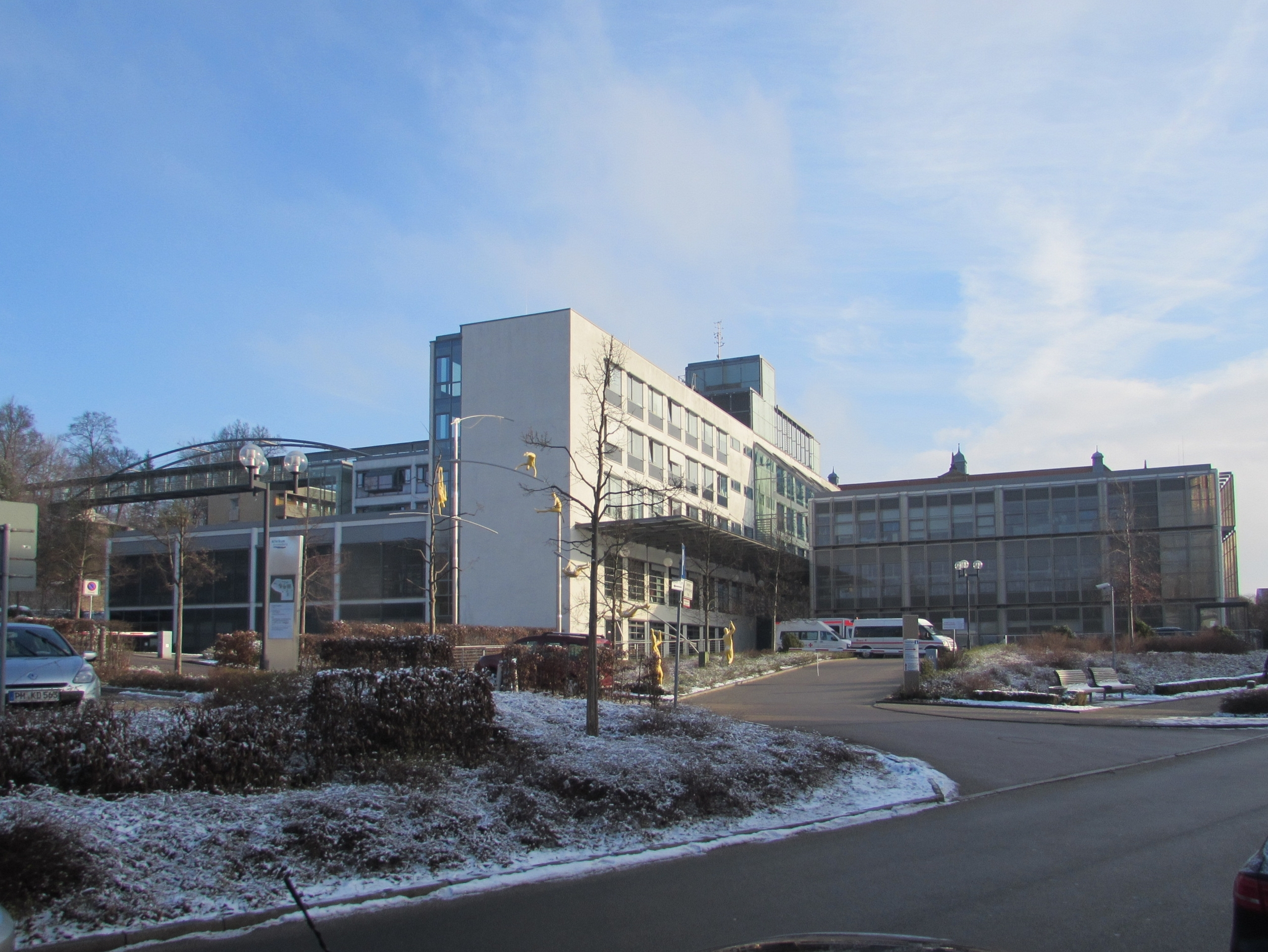 Neubau west städtisches klinikum brb